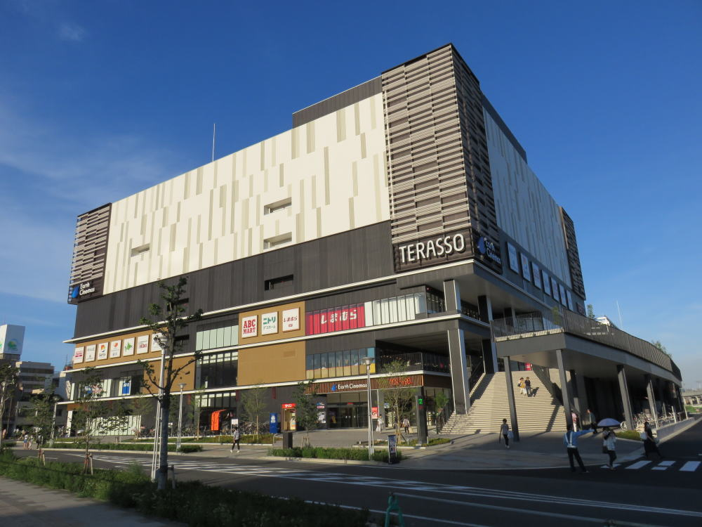 兵庫県姫路市にある商業施設「テラッソ姫路」。南西面。